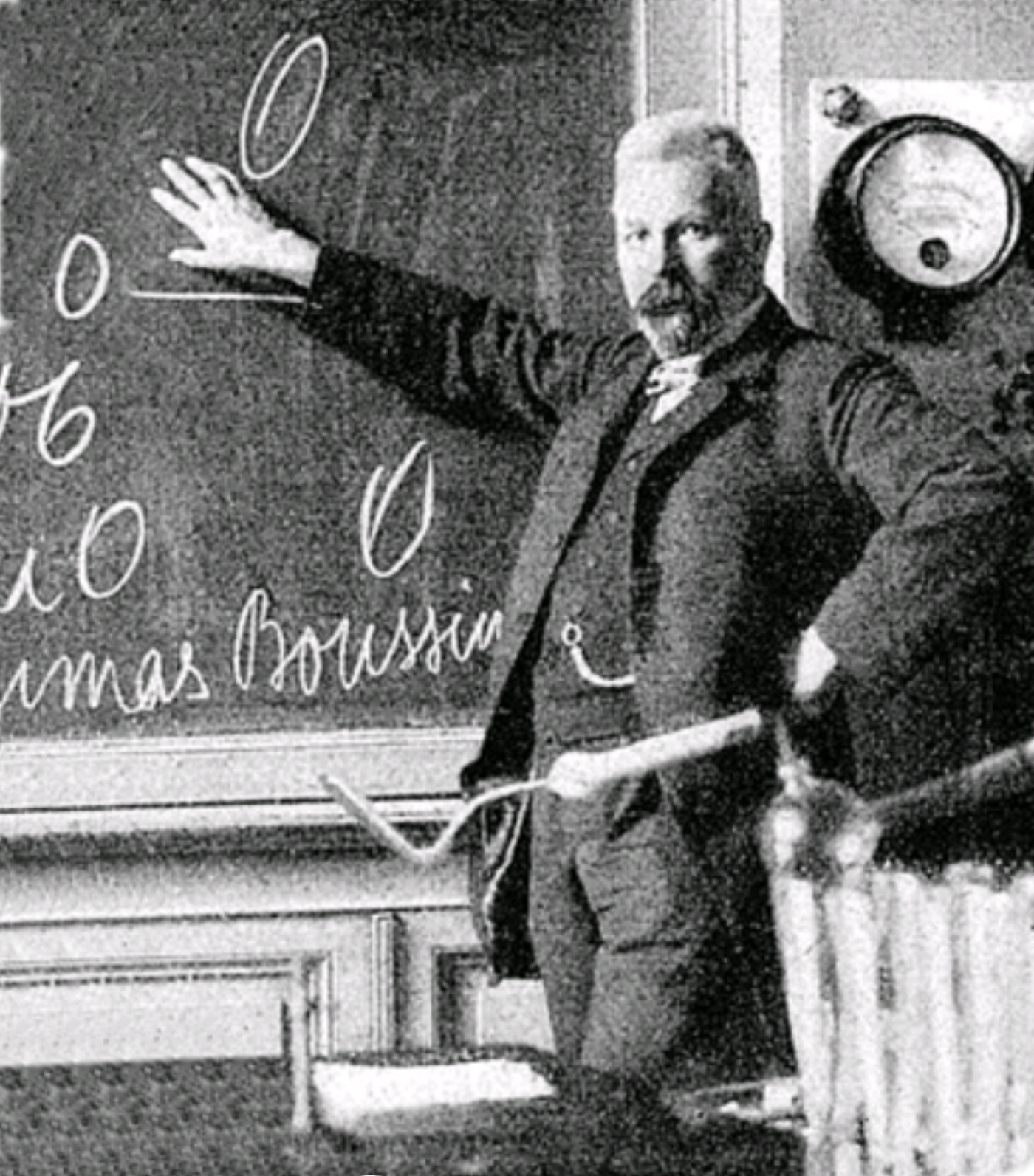 Eduard Buchner (* 20. Mai 1860 in München; † 13. August 1917 in Focșani, Rumänien)